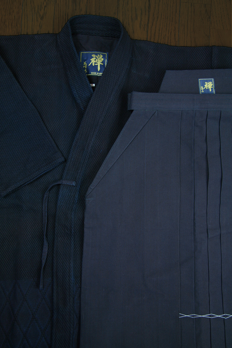 禅 剣衣袴 - 株式会社三恵